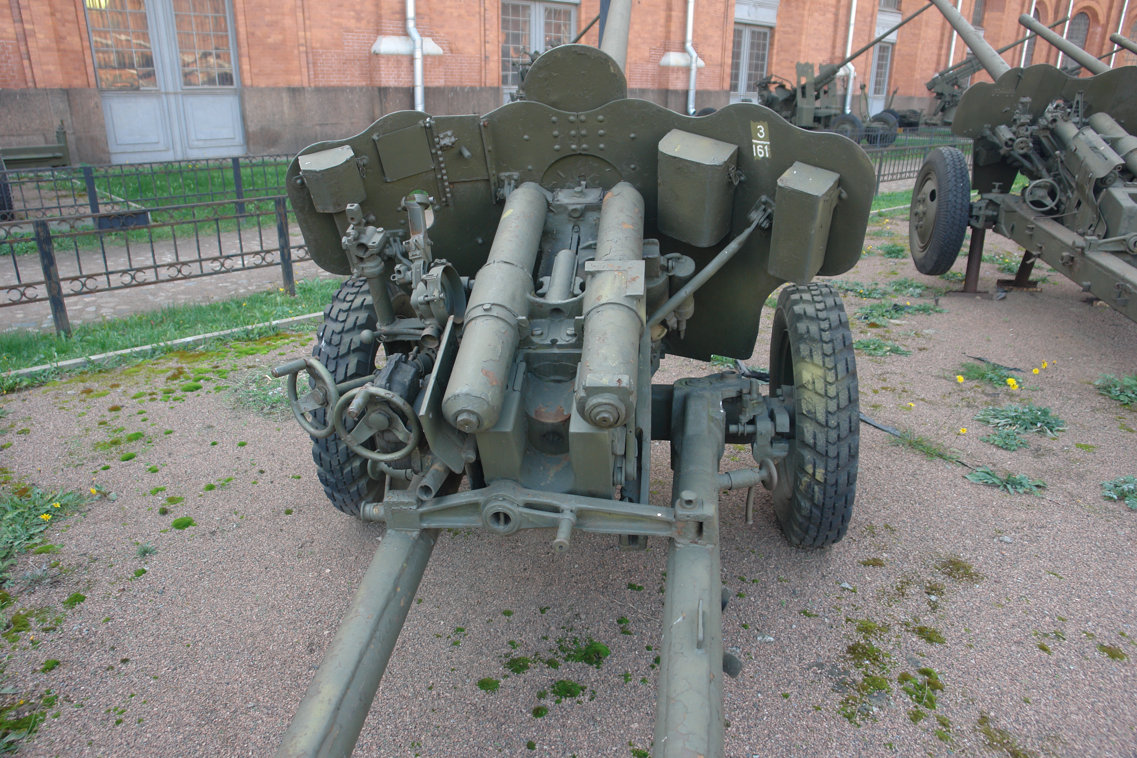 85-мм ДИВИЗИОННАЯ ПУШКА Д-44 ПРИНЯТА НА ВООРУЖЕНИЕ В 1946 г. ГЛАВНЫЙ КОНСТРУ^ОР Ф.Ф.ПЕТРОВ. ДАЛЬНОСТЬ СТРЕЛЬБЫ-15650 м. СКОРОСТРЕЛЬНОСТЬ - 15-20 ВЫСТР/МИН. МАССА, КГ: ОРУДИЯ-1725 СНАРЯДА-9,5. Военно-исторический музей артиллерии, инженерных войск и войск связи, Санкт-Петербург.